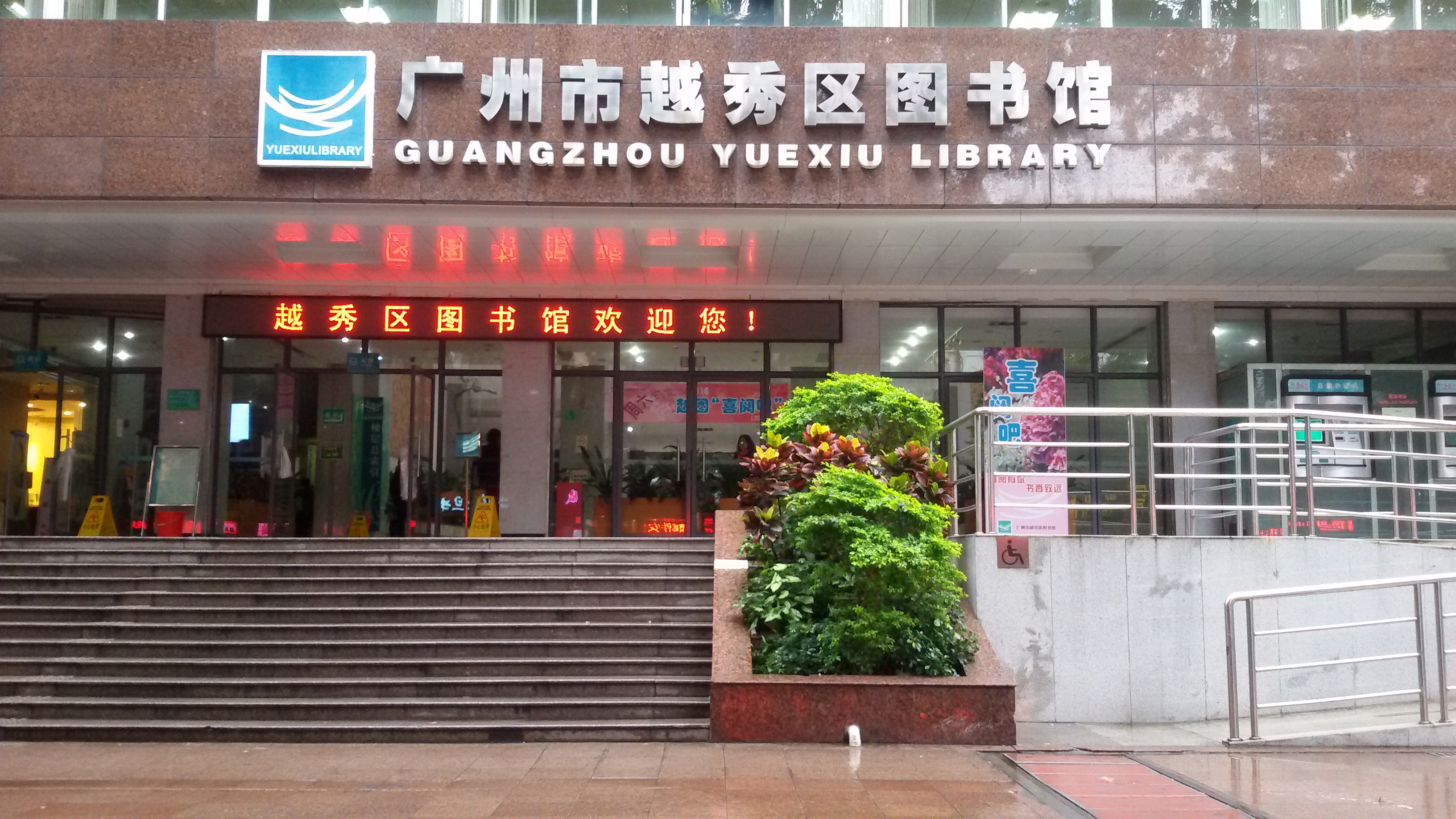 粵語: 广州市越秀区图书馆